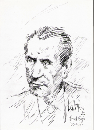 Miguel Torga - Estudo por Carlos Botelho na comemoração do seu 100º aniversário